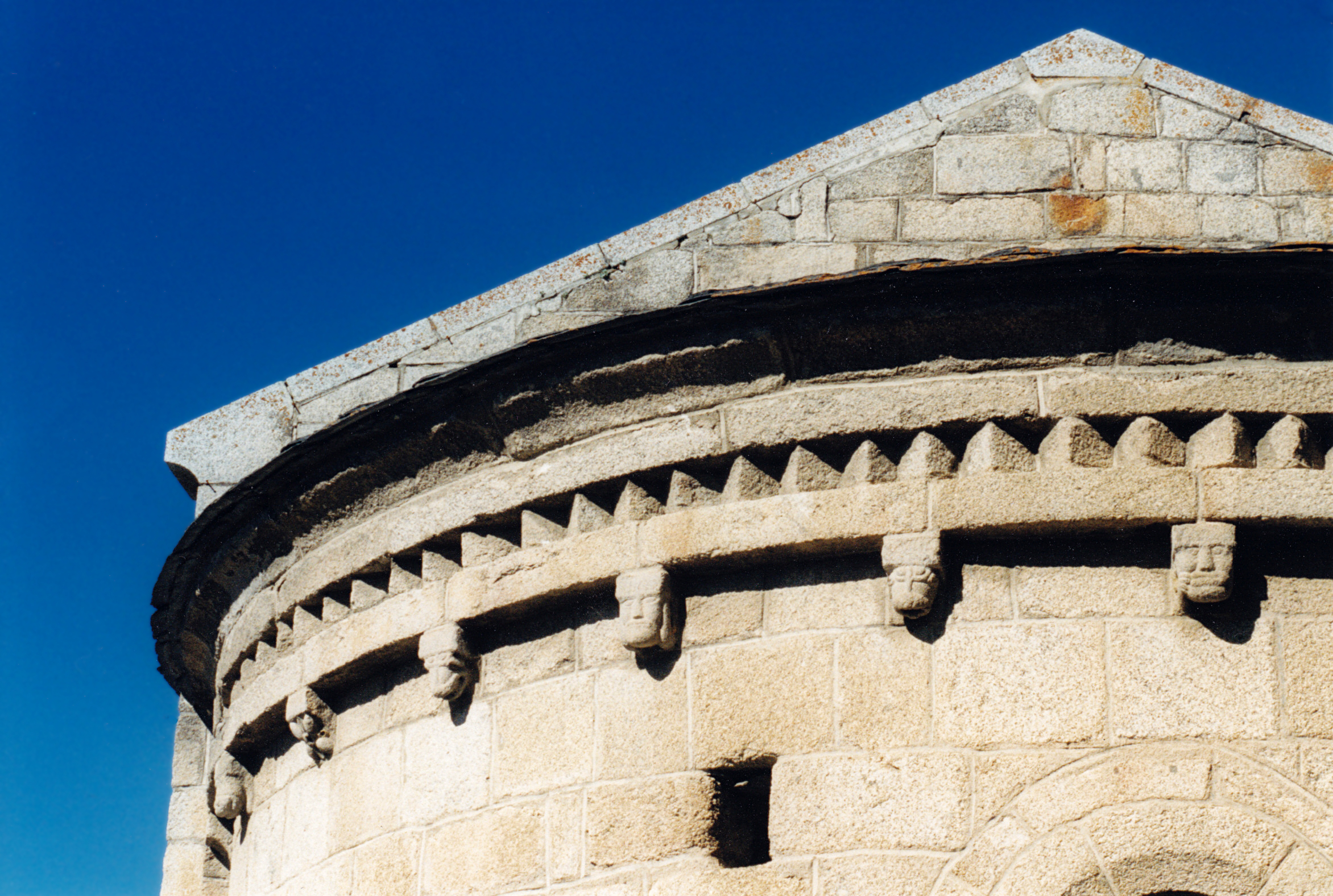 France - Cerdagne - Église Saint-Julien d'Estavar